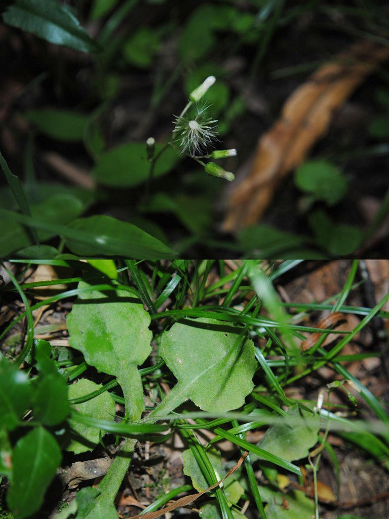 Podocoma notobellidastrum. Asteraceae. Fotos tomadas bajo bosque ribereño al margen del Gajo del Arroyo Tranqueras en Los Rodríguez, departamento de Tacuarembó. Uruguay.